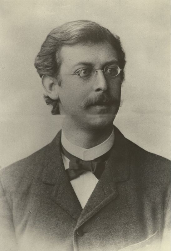 Rudolf Stammler, německý právní filosof